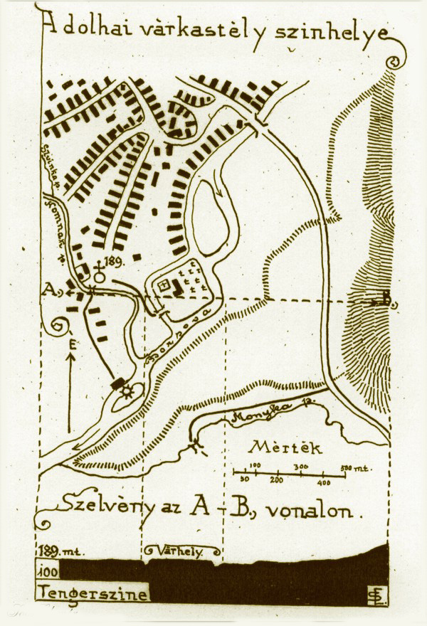 Довжанський замок - реконструкція Шооша Елемера